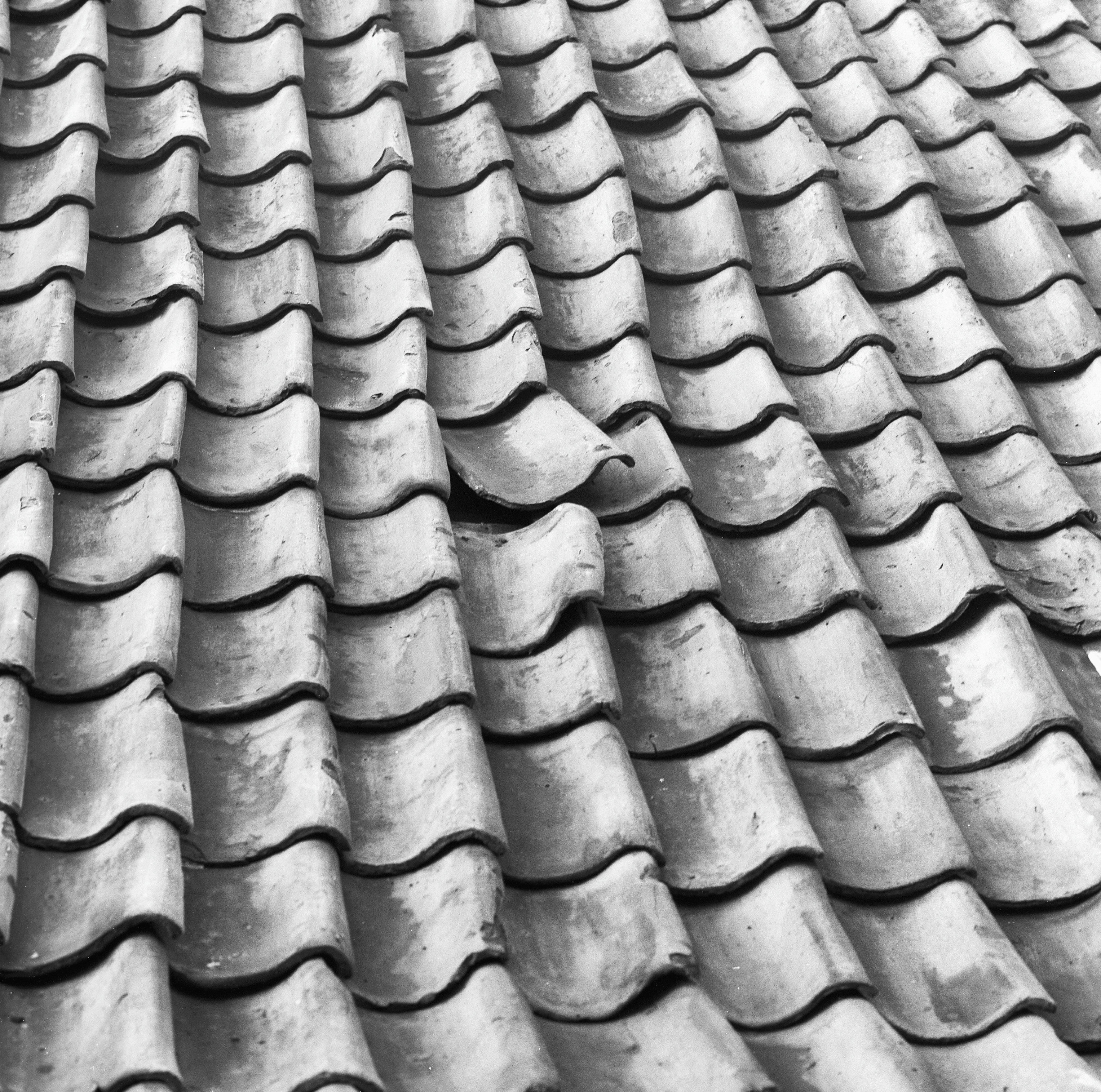 Onderhoud/ Dakbedekking: Slecht onderhoud aan dakbedekking